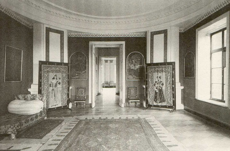 A room in Snegirevo/Cherkutino Hall